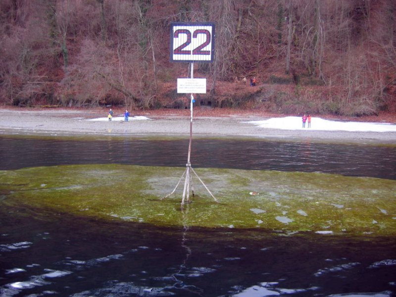 Teufelstisch am Bodensee beim Jahrhunderttiefstand Date = 18.02.2006 Author = Rainer Sachsenberg